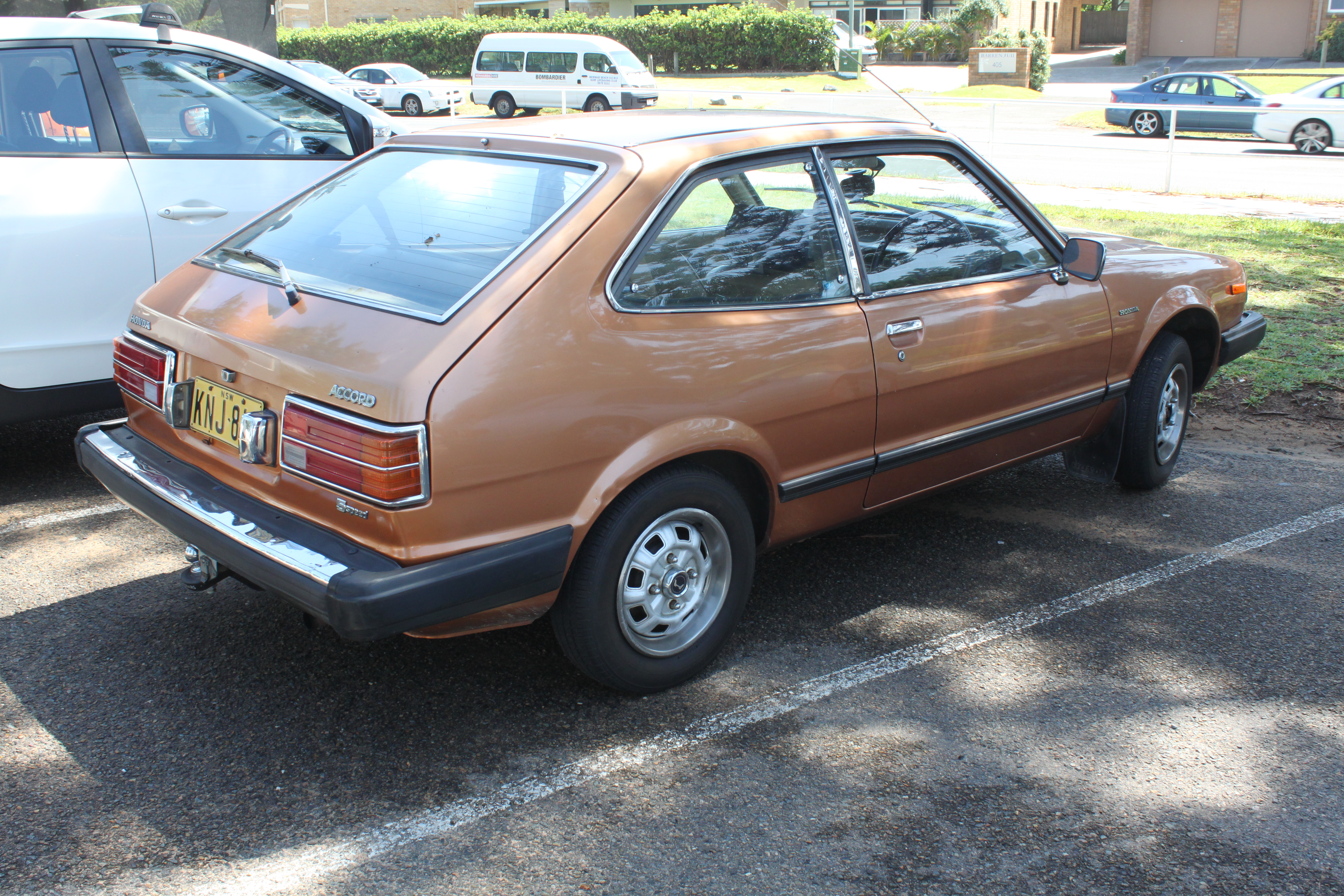 1980 Honda Accord